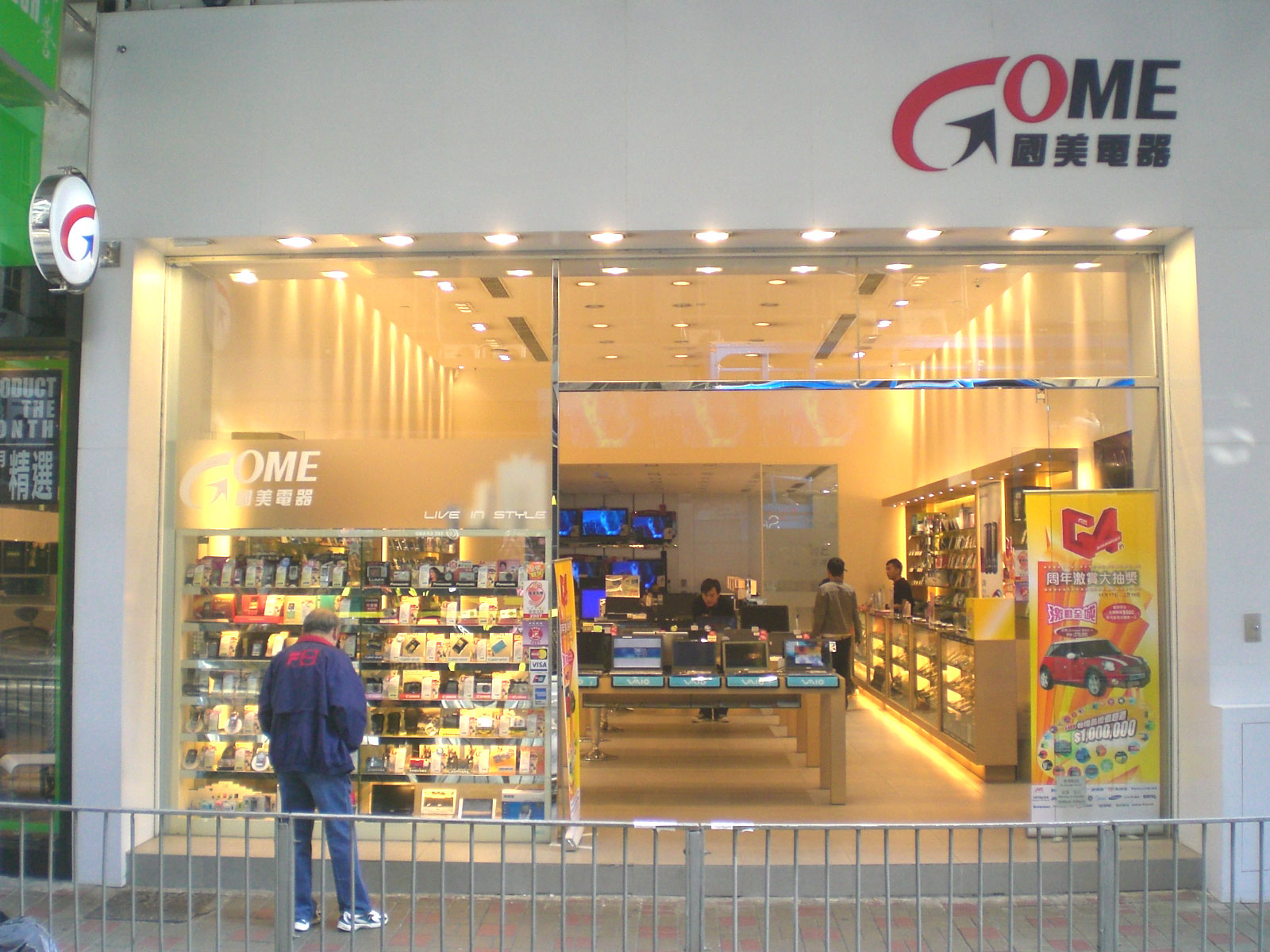 國美電器, GOME 商店, 德輔道中, Central, Hong Kong